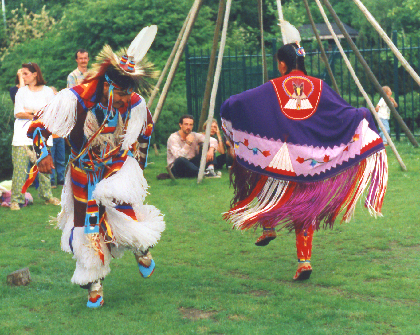 Öffentliche Powwow-Tanzvorführung im Naturkundemuseum Münster